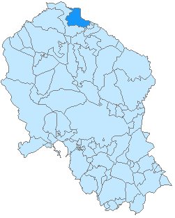 Mapa de Santa Eufemia en la provincia de Córdoba, Andalucía, España.